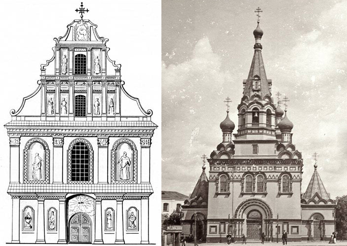 Беларуская (тарашкевіца): Маскалізацыя (русіфікацыя) Вялікага Княства Літоўскага. Места Менск. Царква Сьвятога Духа, помнік архітэктуры готыкі і рэнэсансу XVII стагодзьдзя: аўтэнтычны выгляд (налева) і па частковым руйнаньні ў выніку маскоўскай перабудовы (направа)